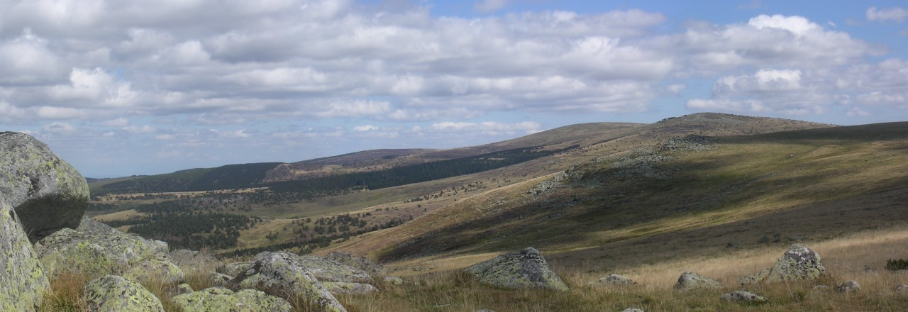 Pic de Finiels - Mont Lozère